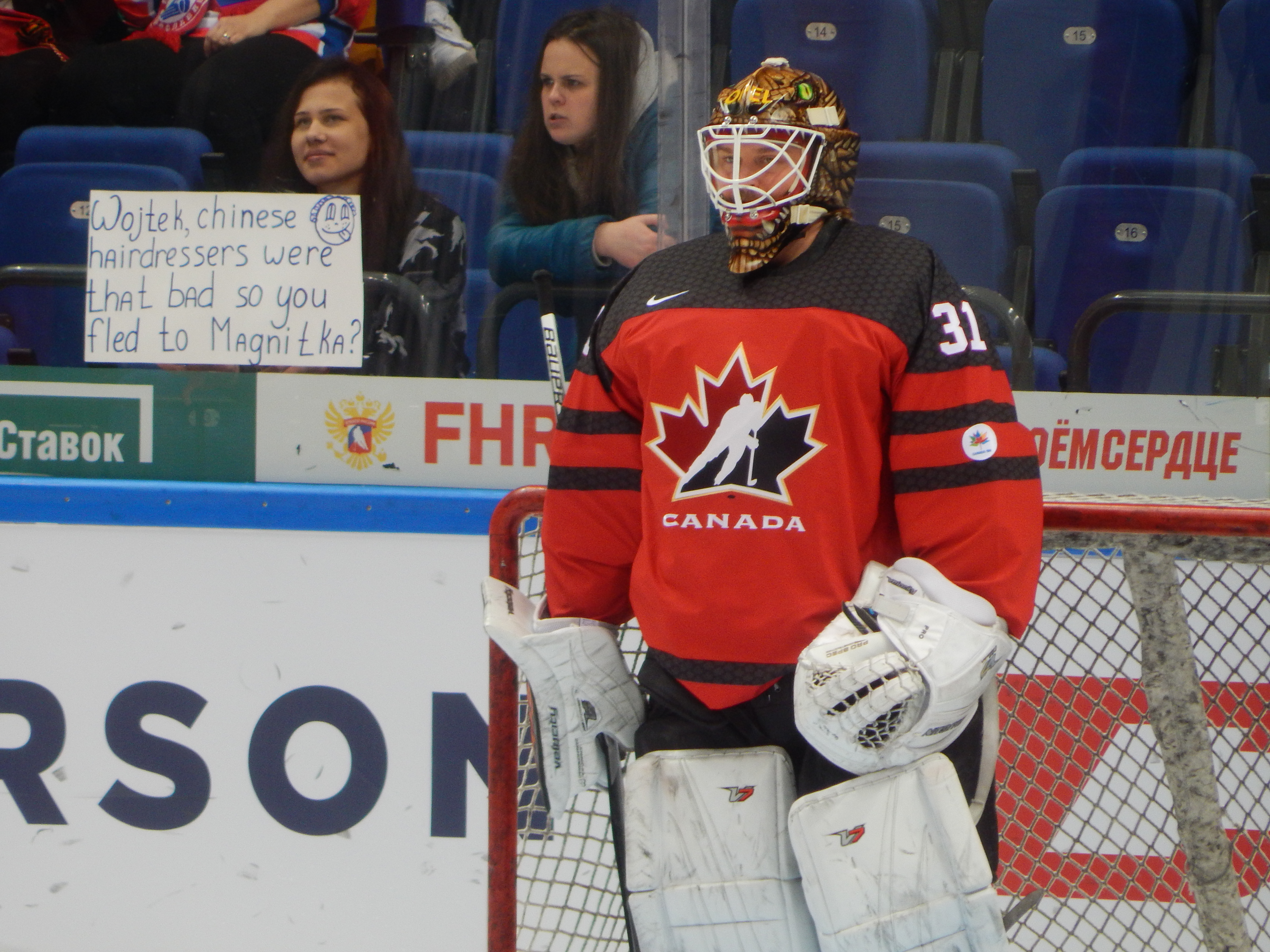 Кубок Первого Канала 2017, матч Чехия - Канада (15 декабря 2017) 31 BRUST,Barry